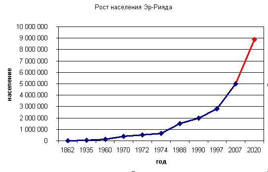 График населения Эр-Рияда